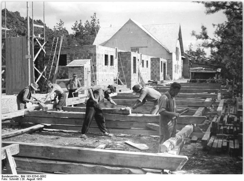 Weißagk, LPG, Bau eines Stalls Zentralbild Schutt-Wjt-Qu-28.8.1955 Zum 10. Jahrestag der demokratischen Bodenreform-Richtfest am 10. Jahrestag-Über der LPG "Aufbau" in Weißagk-Kreis Forst-Lausitz wird am 3. September 1955 eine Richtkrone wehen. Der zweite Teil des Kuhstalles der LPG wird bis zu diesem Tage gerichtet sein, weil nicht nur die Genossenschaftsbauern, sondern auch die werktätigen Einzelbauern den Zimmerleuten halfen. Junker von Tracke, dessen Großgrundbesitz vor 10 Jahren in die Hände derjenigen überging, die den Boden für den Nichtstuer bearbeiteten, hat für alle Zeiten ausgewirtschaftet. Die ehemaligen Landarbeiter und kleinen Bauern regten ihre Hände in den 10 Jahren. Sie schlossen sich zu einer LPG zusammen und konnten gemeinsam viele Richtfeste feiern. Für 22 Neubauern wurden Wohn- und Wirtschaftsgebäude errichtet, drei große Schweineställe, ein Futterhaus, eine Kälberaufzuchtstation und ein Teil des neuen Kuhstalles gemeinsam erbaut. Zu Ehren des 10. Jahrestages der demokratischen Bodenreform erfüllte die Gemeinde Weißagk bereits ihre gesamte Getreideablieferung. UBz: Hier wird am 3. September die Richtkrone über dem neuen Kuhstallgebäude wehen.